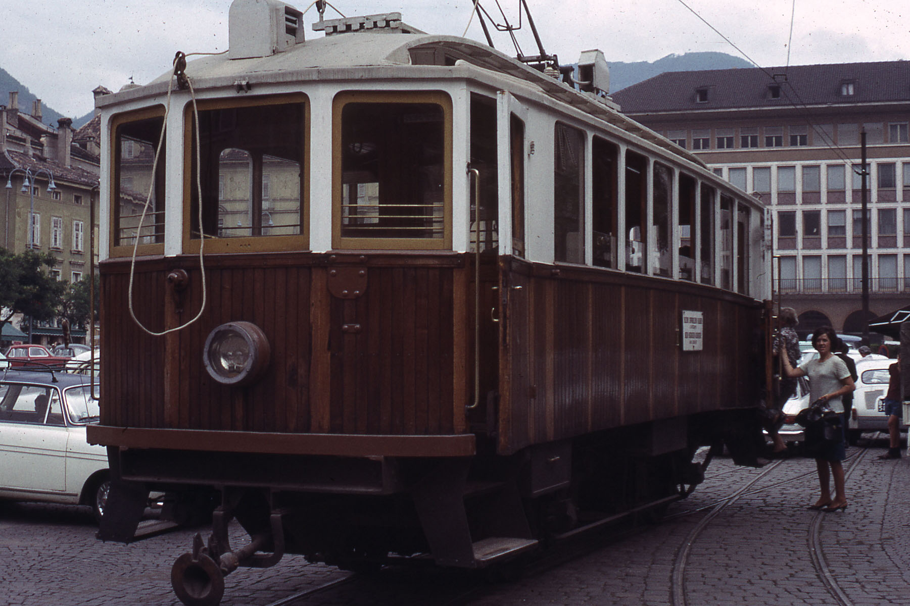 Zweiachsiger Triebwagen an der Abfahrtstelle am Waltherplatz.